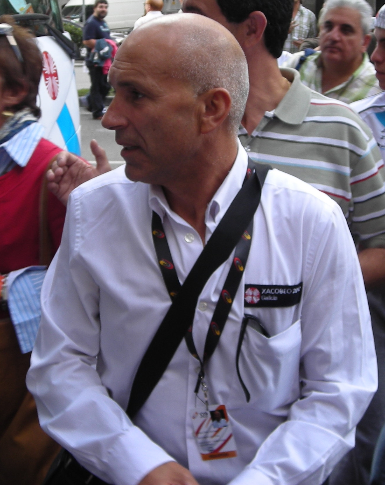 Álvaro Pino, director técnico do Xacobeo Galicia, ó finaliza-la "Vuelta ciclista a España", en 2009.